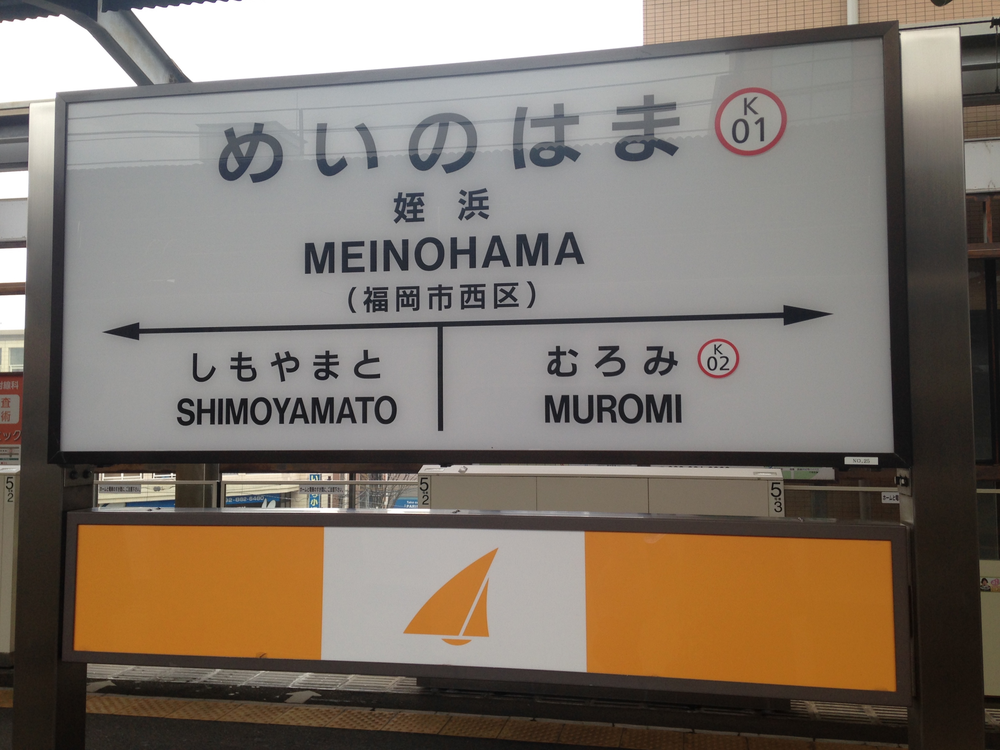 姪浜駅の駅名標。イラストは小戸ヨットハーバーのヨット